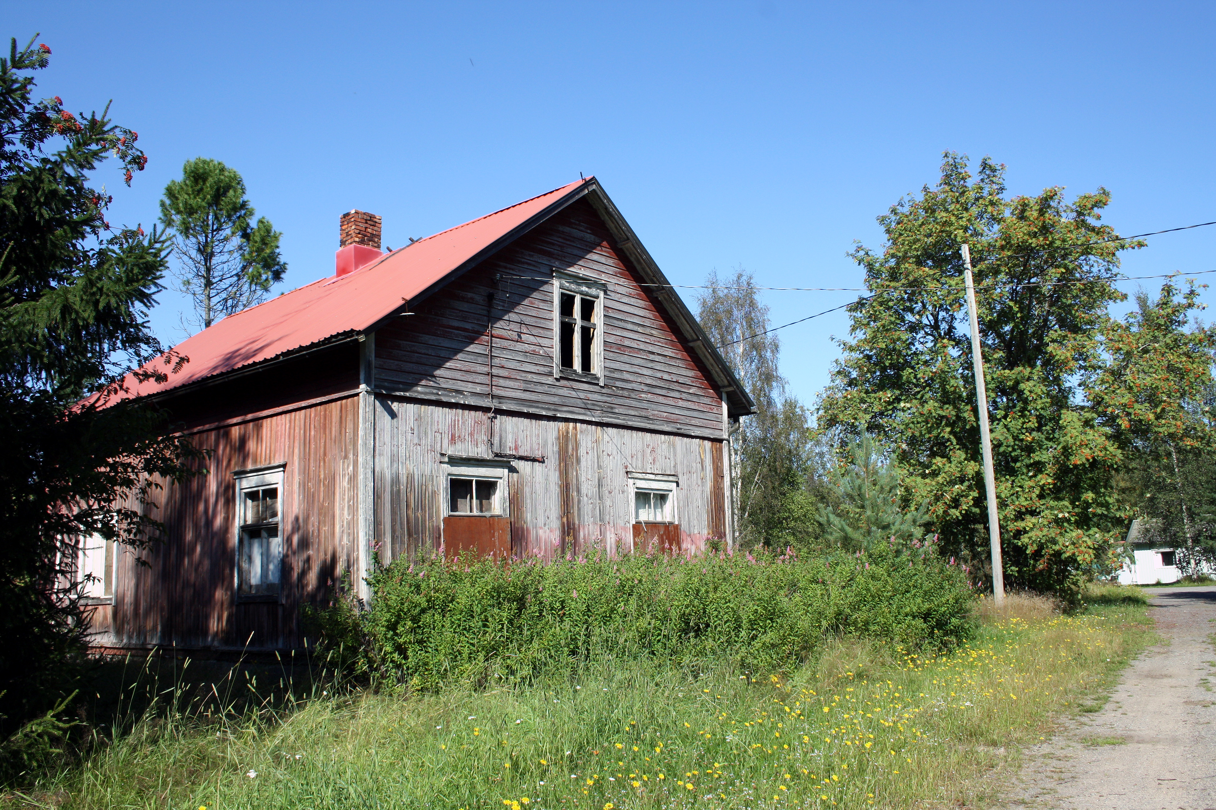 Matalamaan kaupunginosaa Kokkolassa.